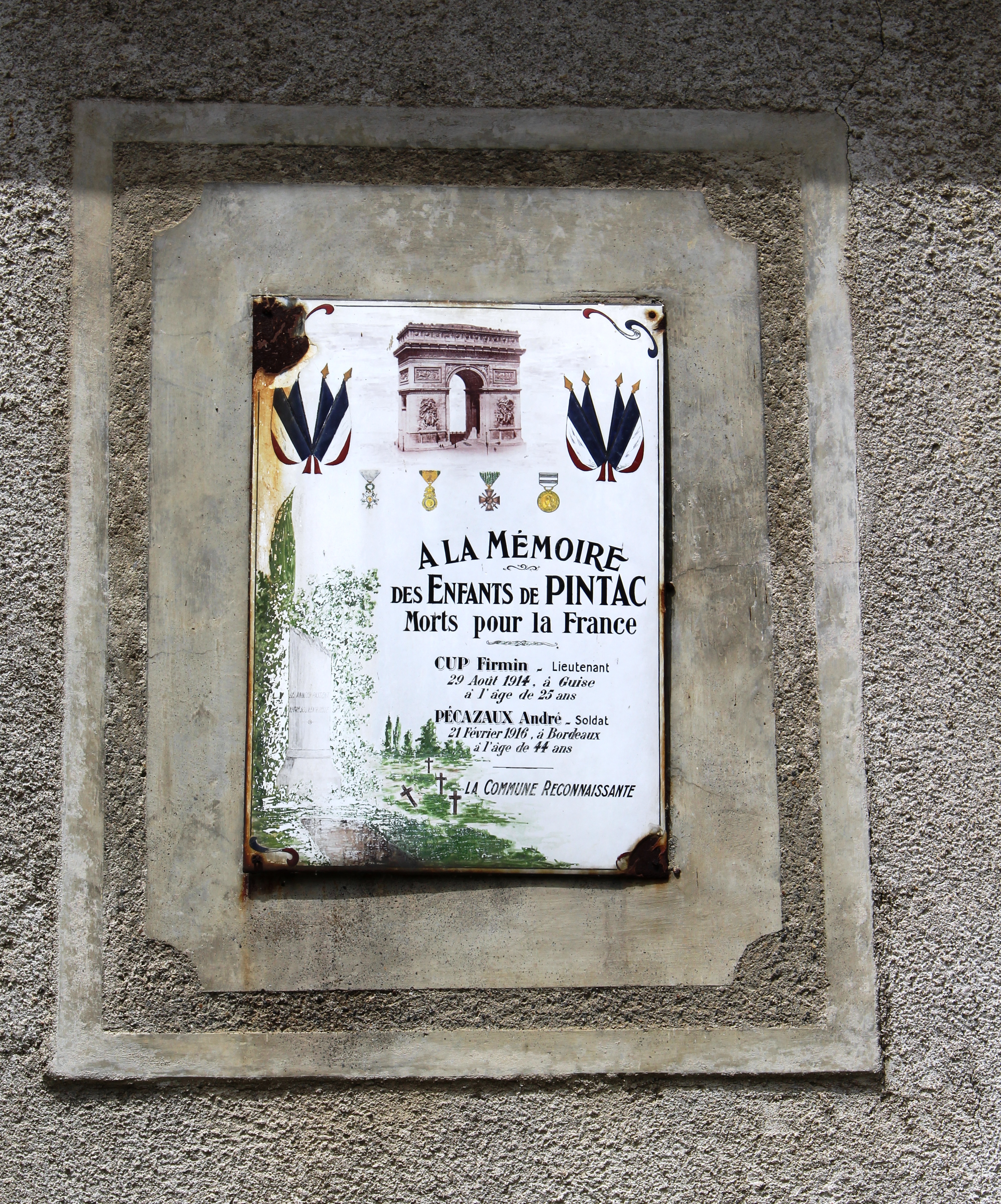 Monument aux morts de Pintac (Hautes-Pyrénées)